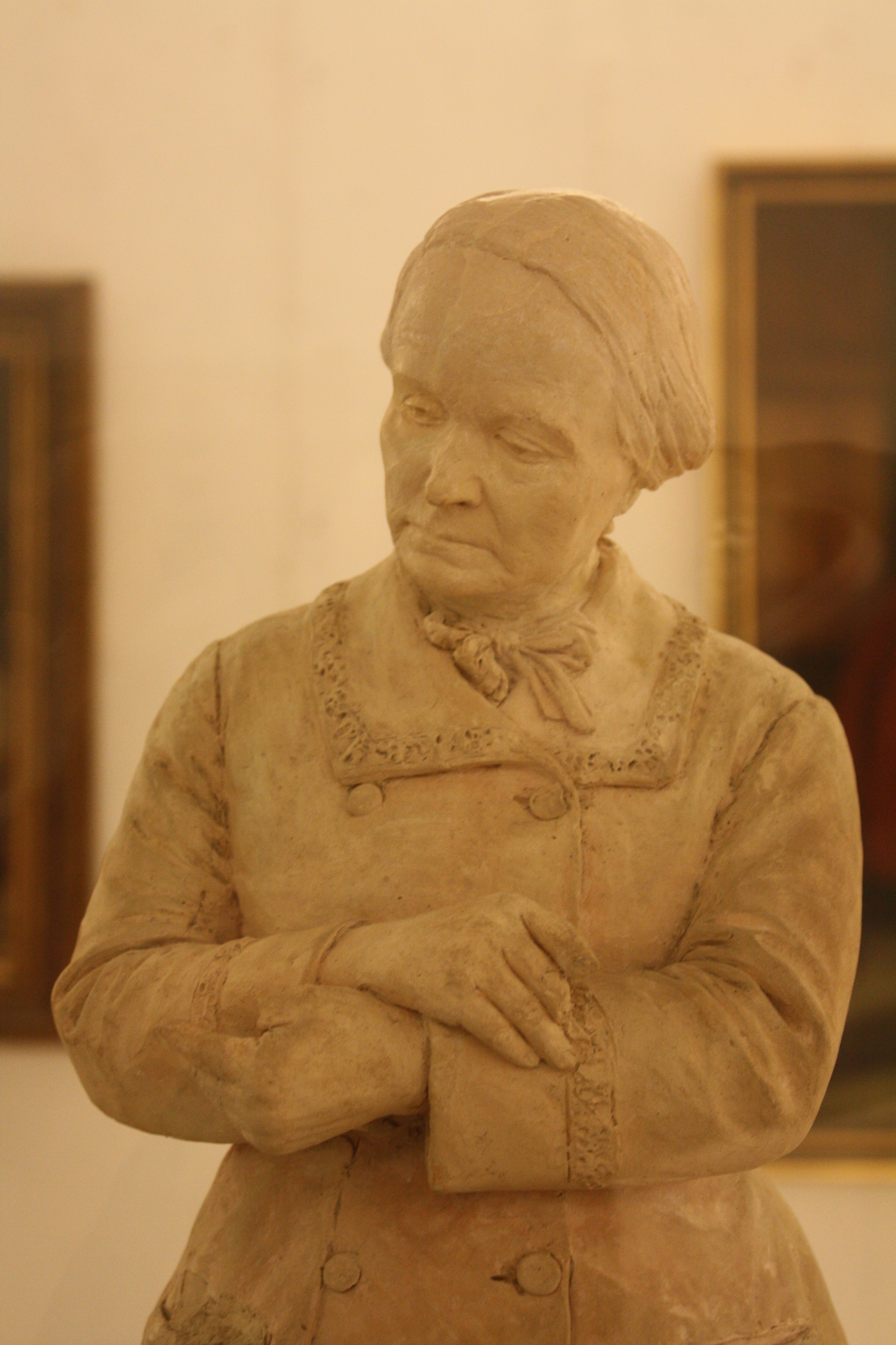 Concepción Arenal (1896), de Isidoro Brocos Gómez (1841-1914), exposta no Museo de Pontevedra.